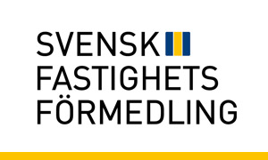 Svensk Fastighetsförmedling